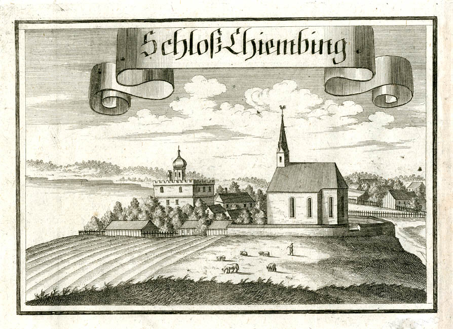 “Schloß Chiembing”. Aus : Beschreibung des Churfürsten- u. Hertzogthumbs Ober- und Nidern Bayrn. Rentamt München, 2. Auflage um 1750 (1. Auflage erschien 1701)